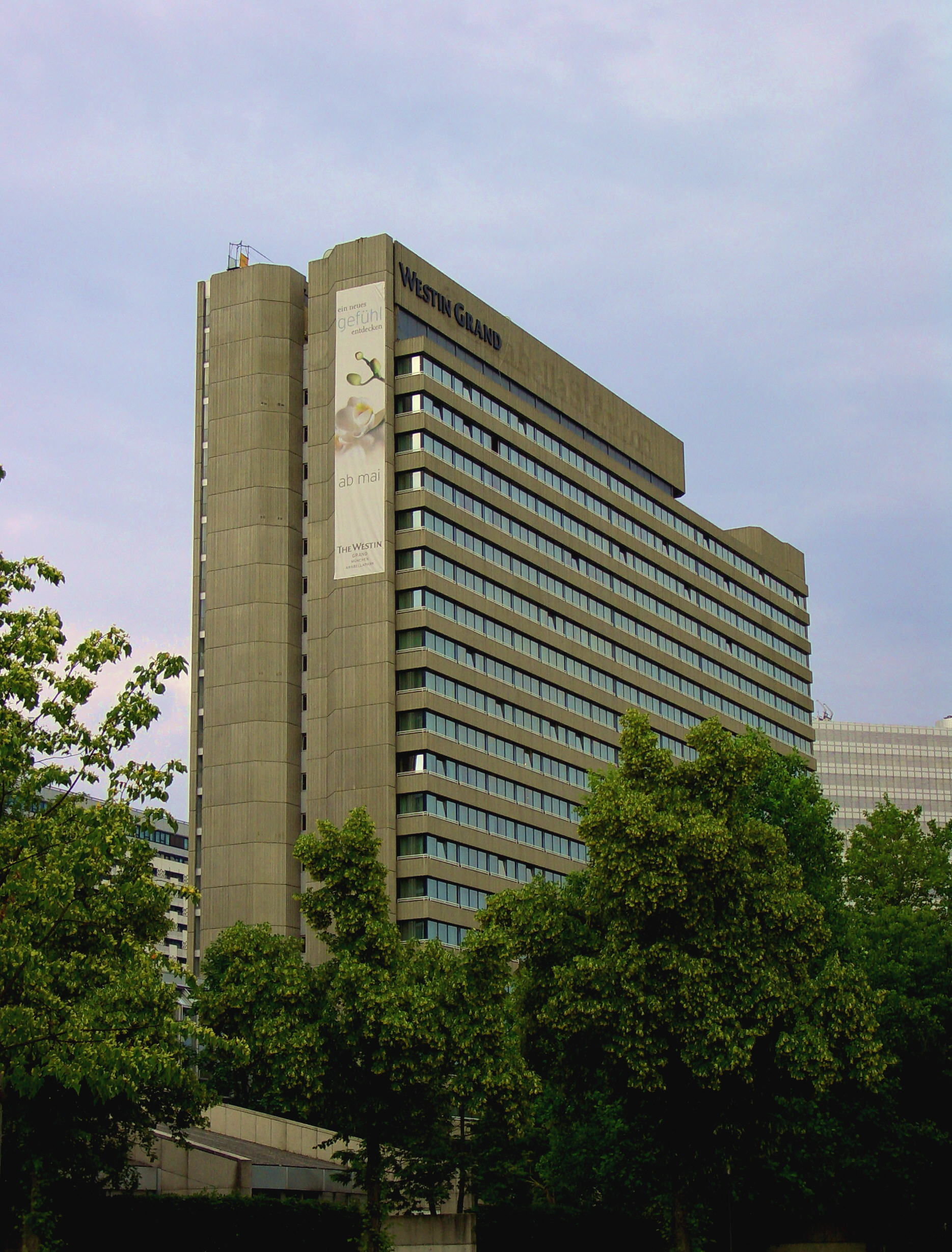 Westin Grand Muenchen Arabellapark von Nordwesten